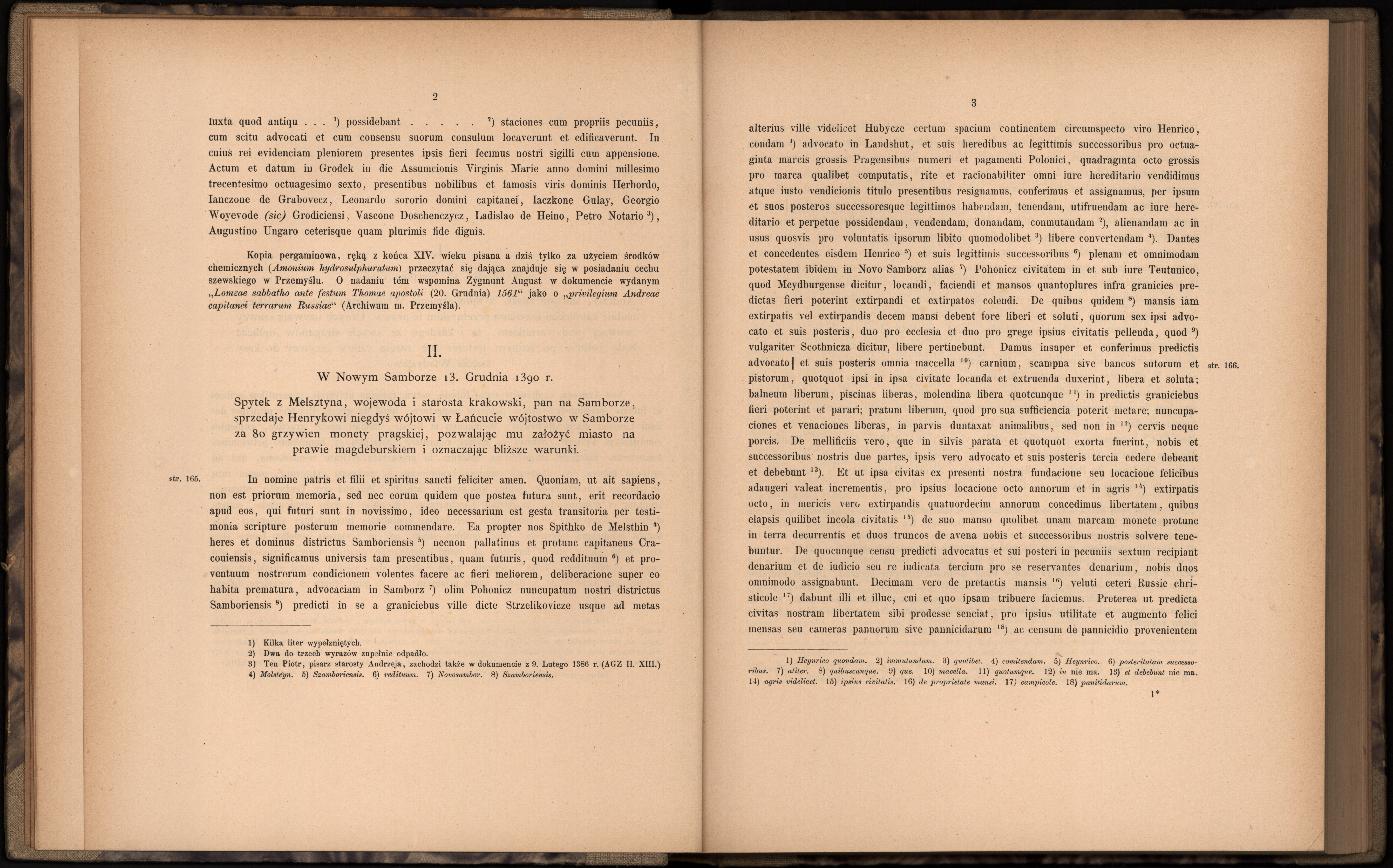 Зміст грамоти від 13 грудня 1390 року